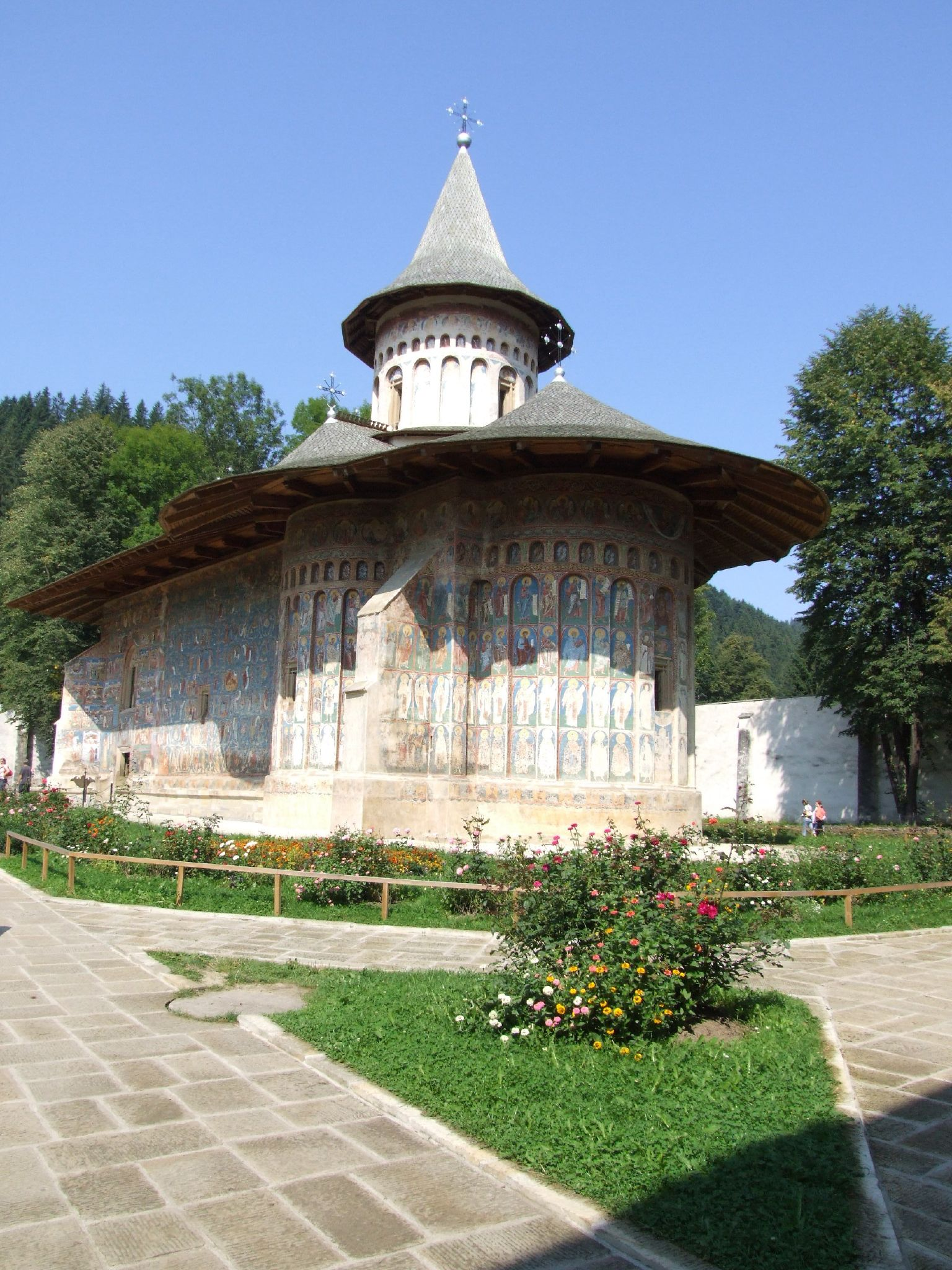 Voroneţ church